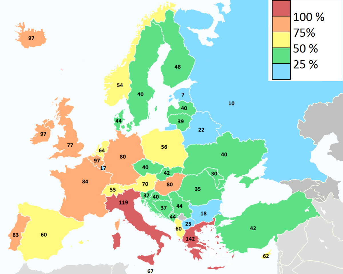 Staatsverschuldung europäischer Staaten in Prozent des BIP 2010 (brutto) / General government gross debt in percent of GDP. Quelle/Source: [1]